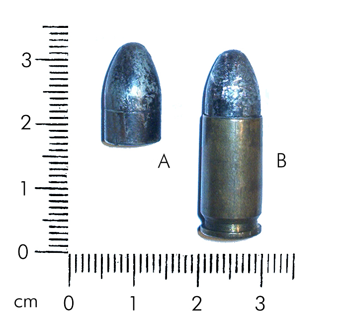 Projektil/Patrone 9mm (P8 oder UZI, MP2) dt. Bundeswehr (schwarze Verfärbung: Kunststoffabrieb der Kugelfangeinrichtung)